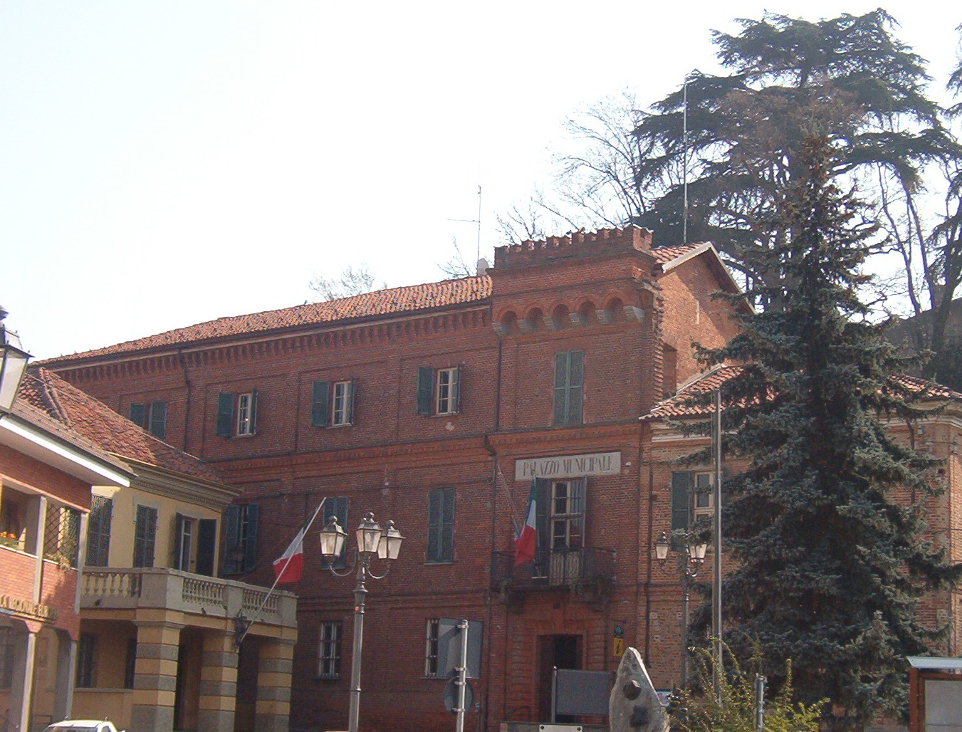 Municipio Sommariva del Bosco - Provincia di Cuneo - Piemonte - Italia